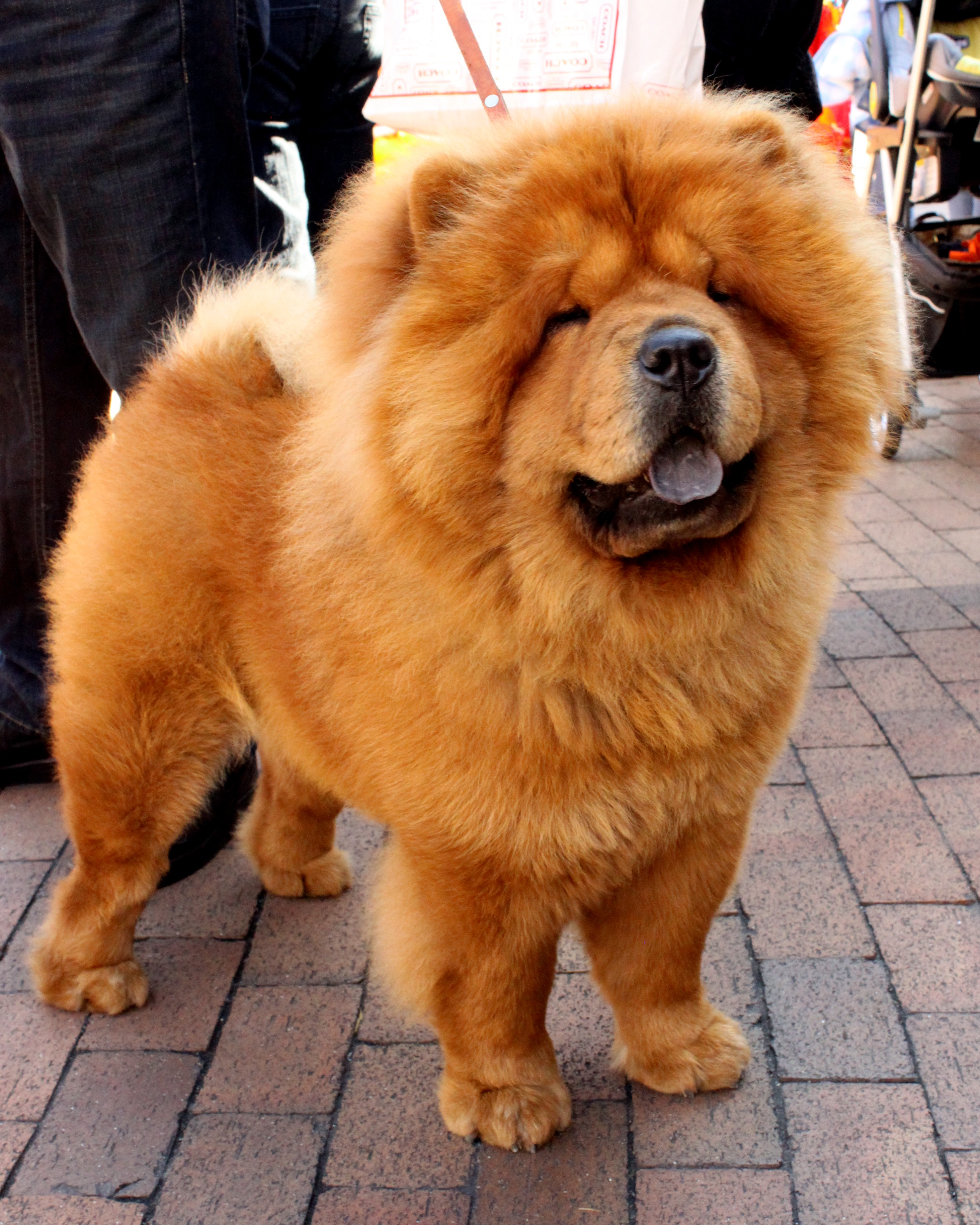 Chow Chow dog